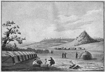 фото рисунка из книги: Буланова О.К. Роман декабриста. Декабрист Ивашев и его семья – М.: Изд-во Всесоюзного общества политкаторжан и ссыльно-поселенцев, 1938, 408 с. Автор рисунка - Ивашев В.П. (1797-1841)